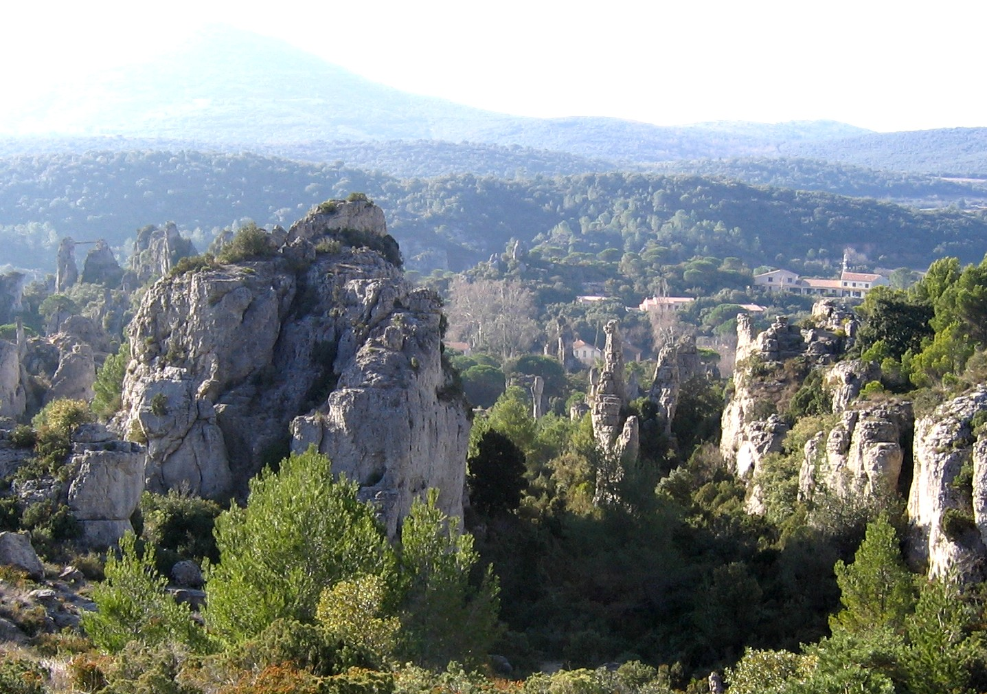 Description: Paysage dolomitique, le Cirque de Mourèze. Hérault, France. Source: Hugo Soria Licence: GFDL Hugo Soria